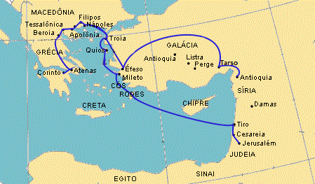 Mapa da 3ª viagem de Paulo